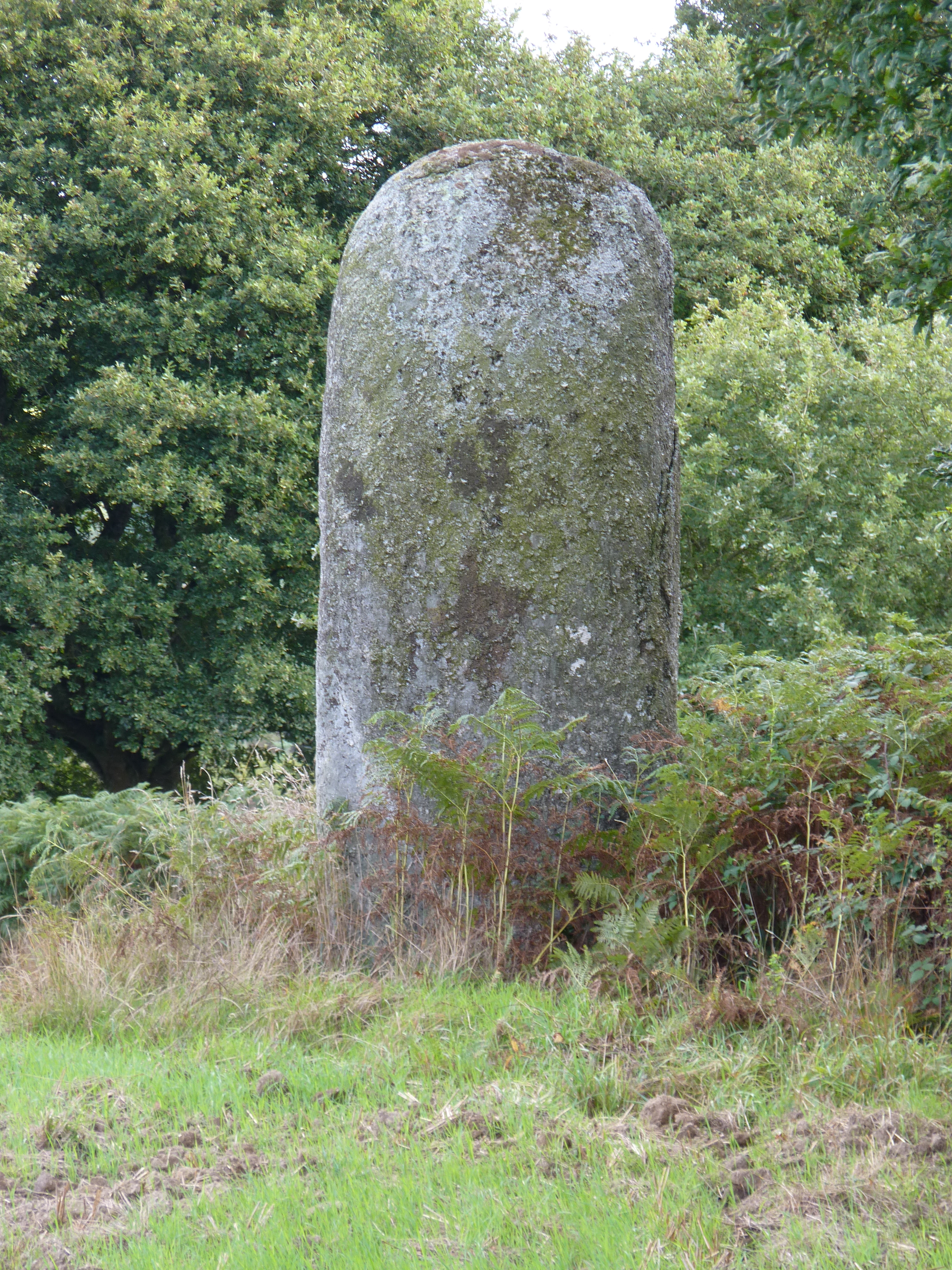 Menhir un peu moins imposant que le premier. Son accès n'est pas balisé (A gauche du chemin en continuant la route (qui devient chemin de terre) qui mène à Kergornec).